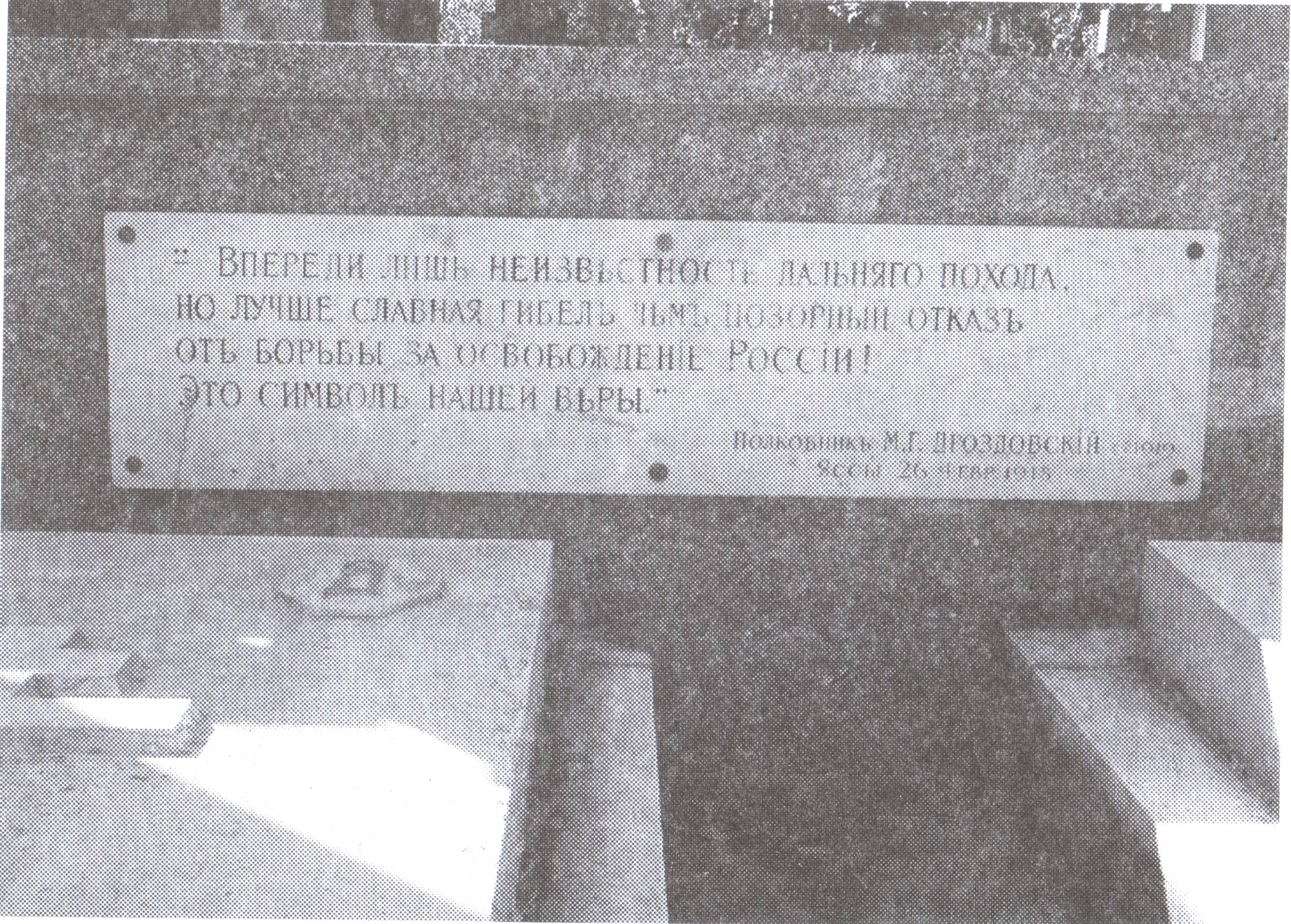 Памяти генерала М.Г. Дроздовского и дроздовцев. Сен-Женевьев-де-Буа